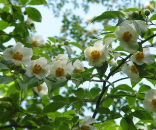 Stewarcja kameliowata Arboretum w Rogowie.